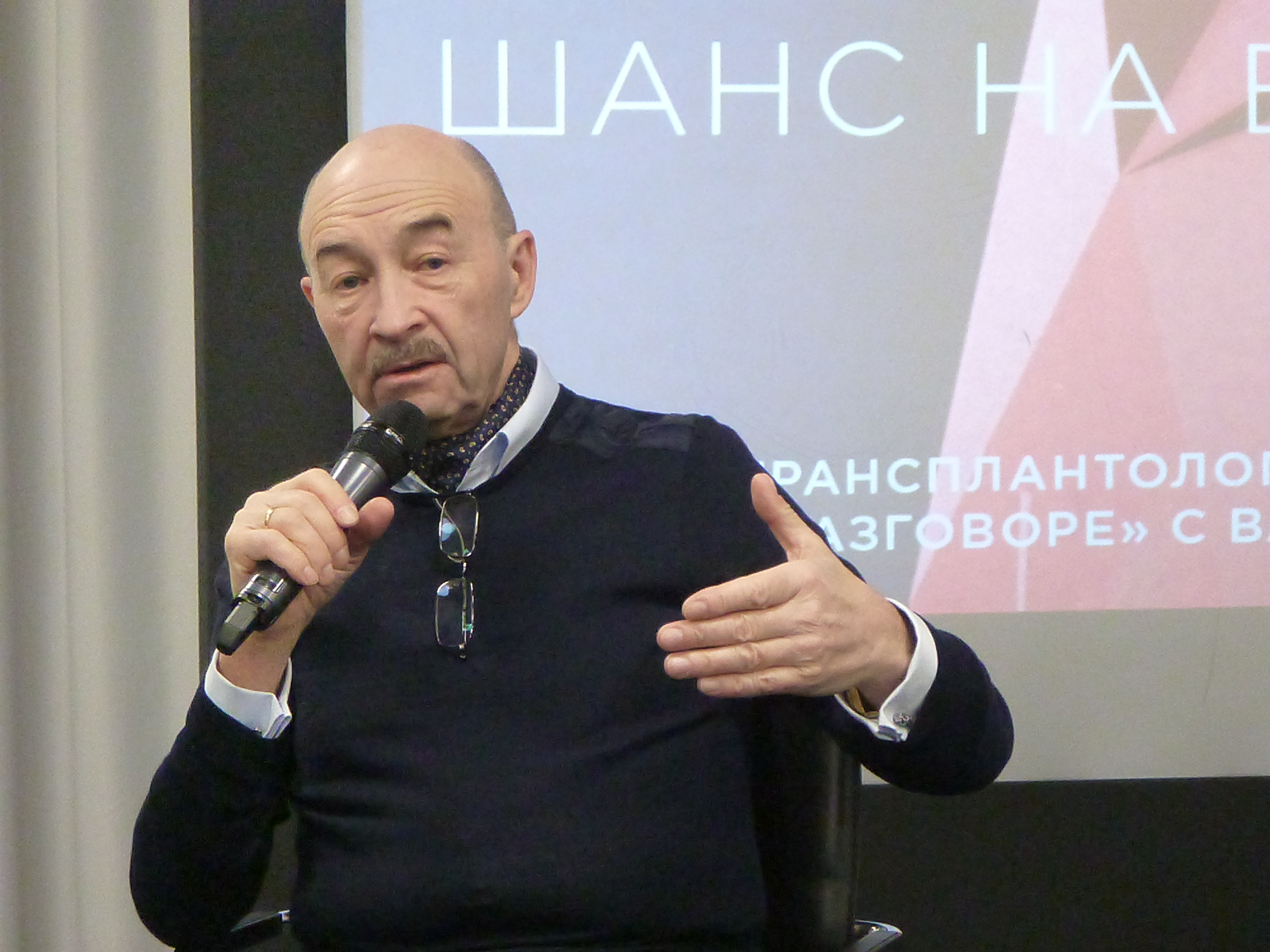 Сергей Готье в Ельцин-центре 13 февраля 2020 года